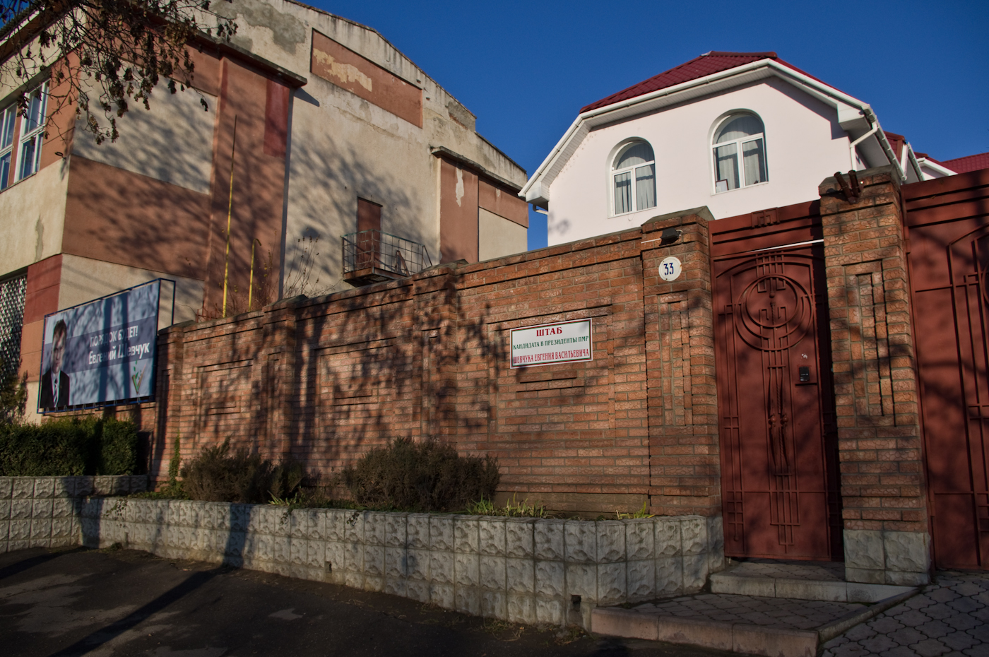 Штаб кандидата в Президенты ПМР Шевчука Е.В.. Тирасполь, улица 25 Октября, 33.